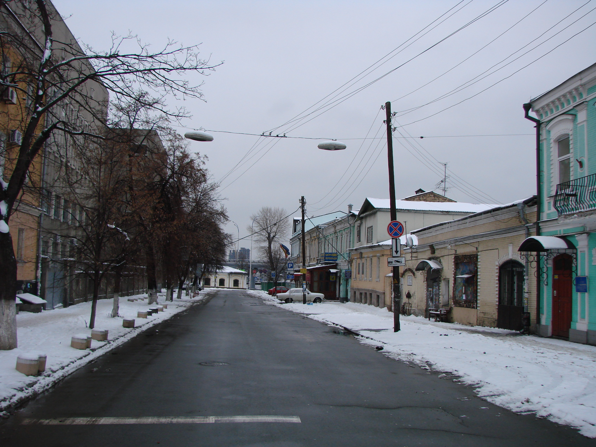 Іллінська вулиця у Києві